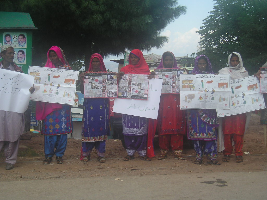 Women in salwar kameez holding signs in Pakistan.